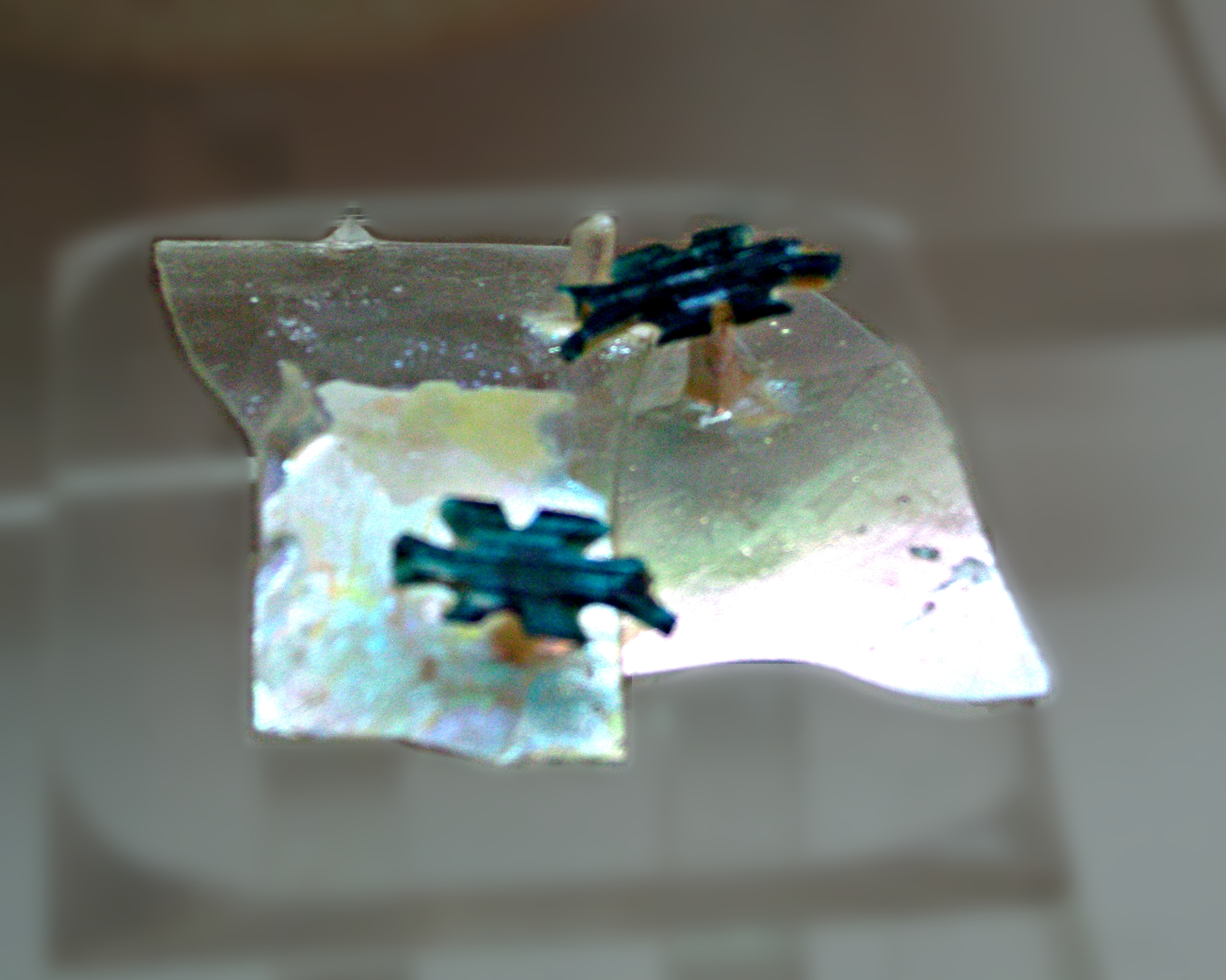 Verre diarète à décor de résille sur fond incolore. C'est la première fois que ce type de verre, rare en dehors de l'Italie, de la Germanie et de la région du Danube, est retrouvé en Afrique du Nord. IVe siècle